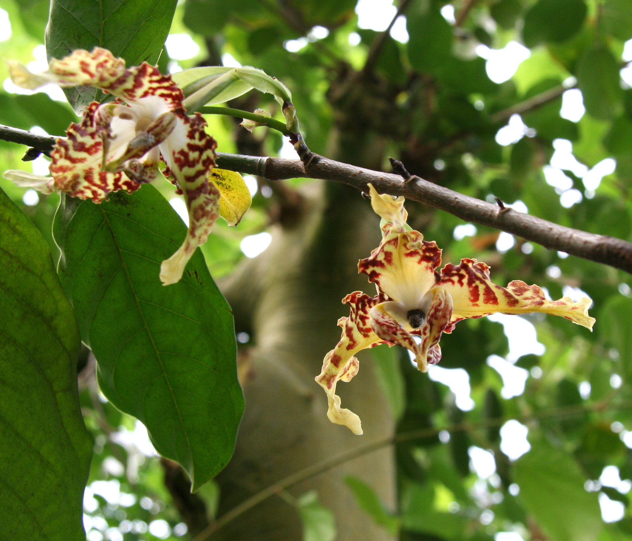 Monodora tenuifolia im Botanischen Garten Dresden